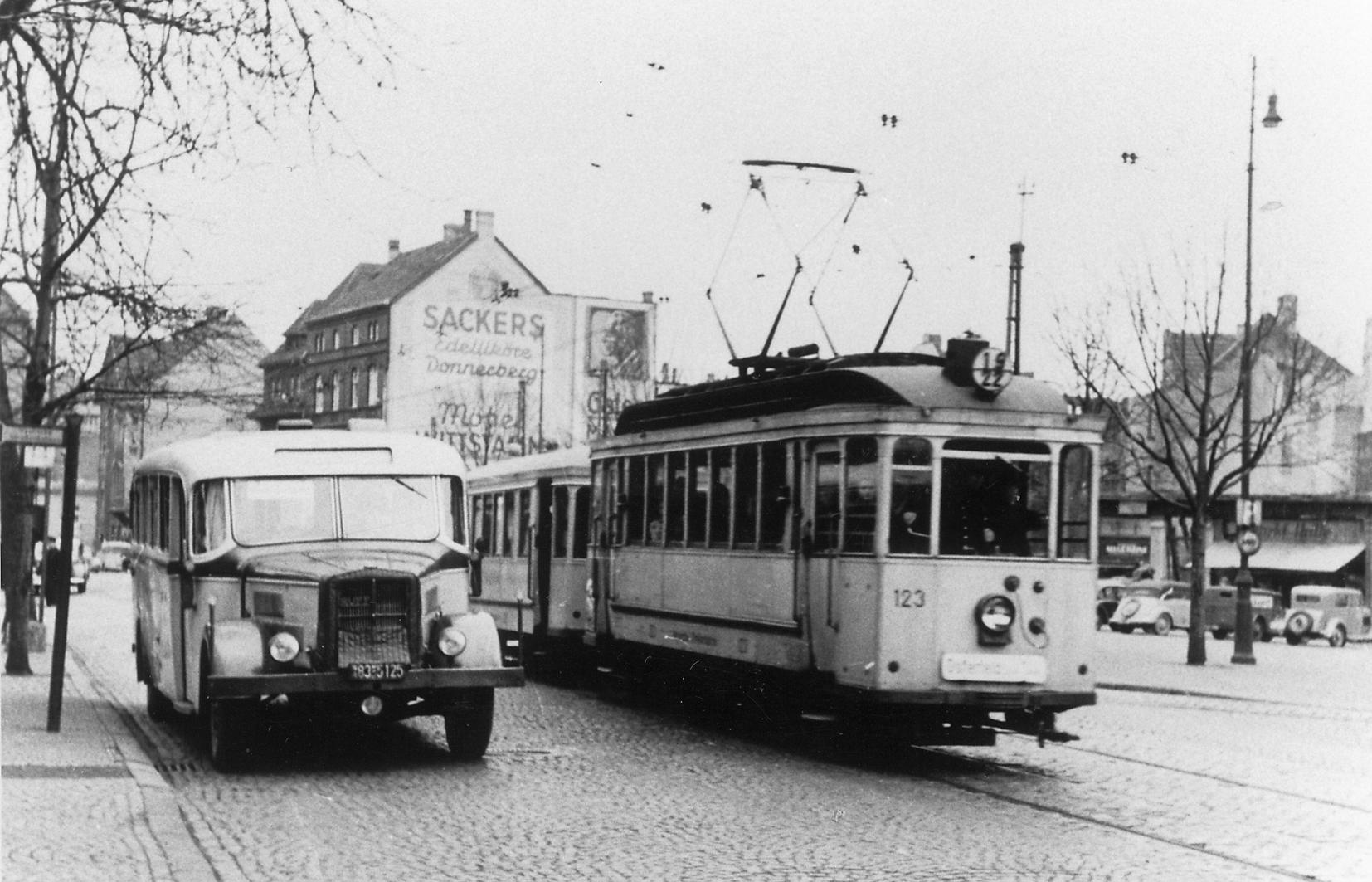 Der Altmarkt in Bottrop in den 40er Jahren